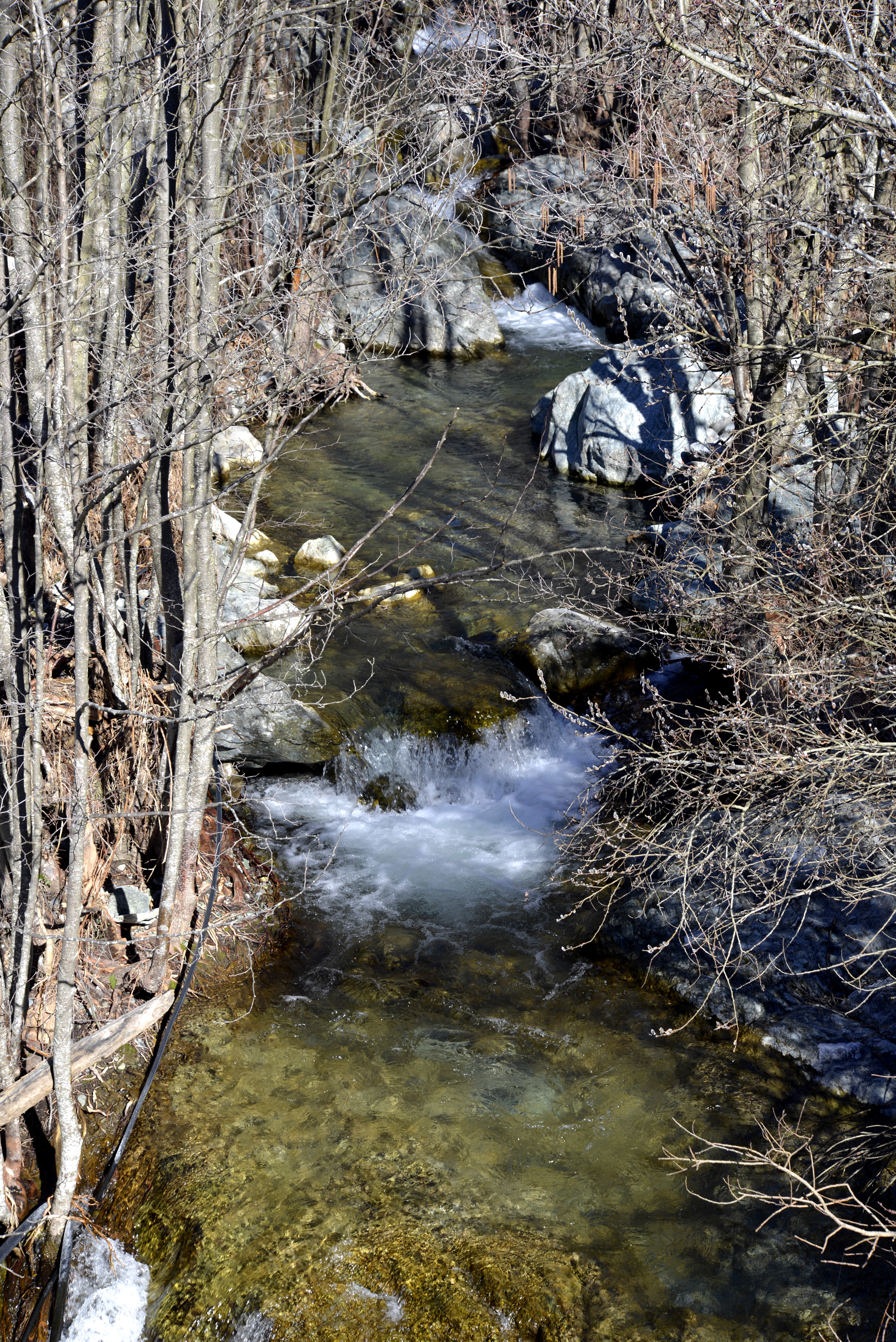 Santa-Lucia-di-Mercurio, Bozio (Haute-Corse) - Le ruisseau de Santa Lucia, qui conflue avec le ruisseau de Bistuglio affluent du Tavignano, en amont du pont de la route D341 à Poggiolo.